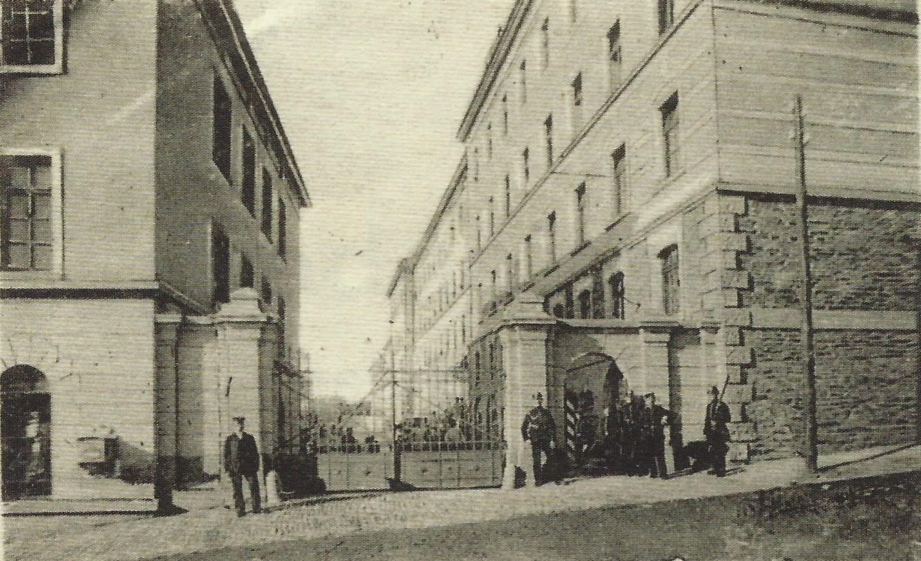 Königliche Unteroffizierschule in Marienberg.